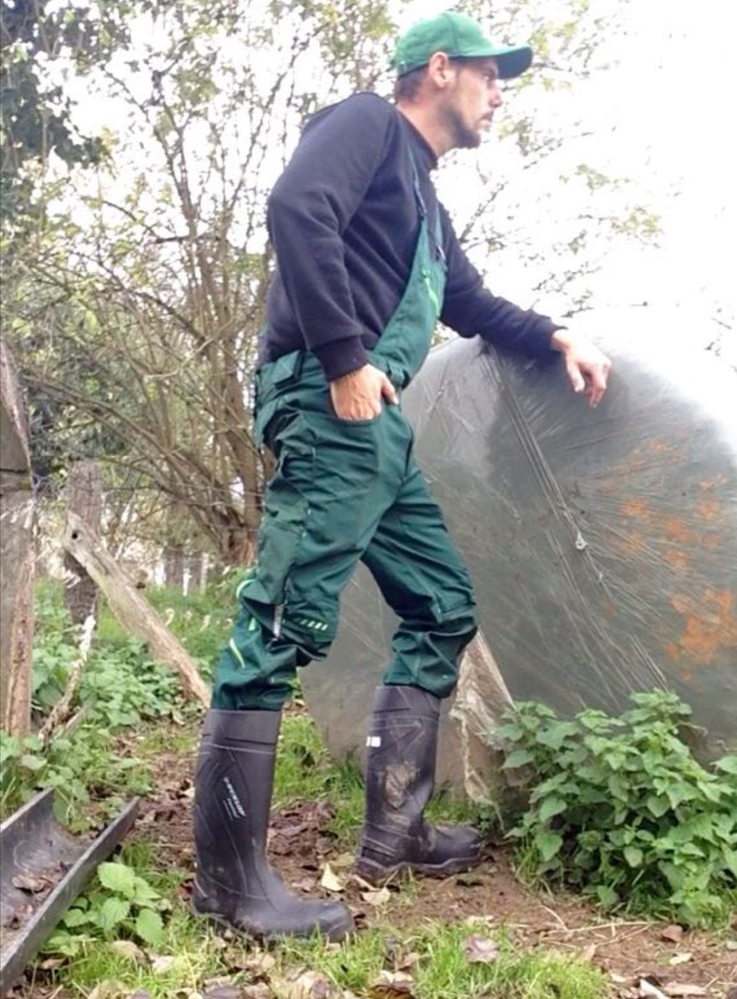 Bauer Gummistiefel Anwendung in der Landwirtschaft